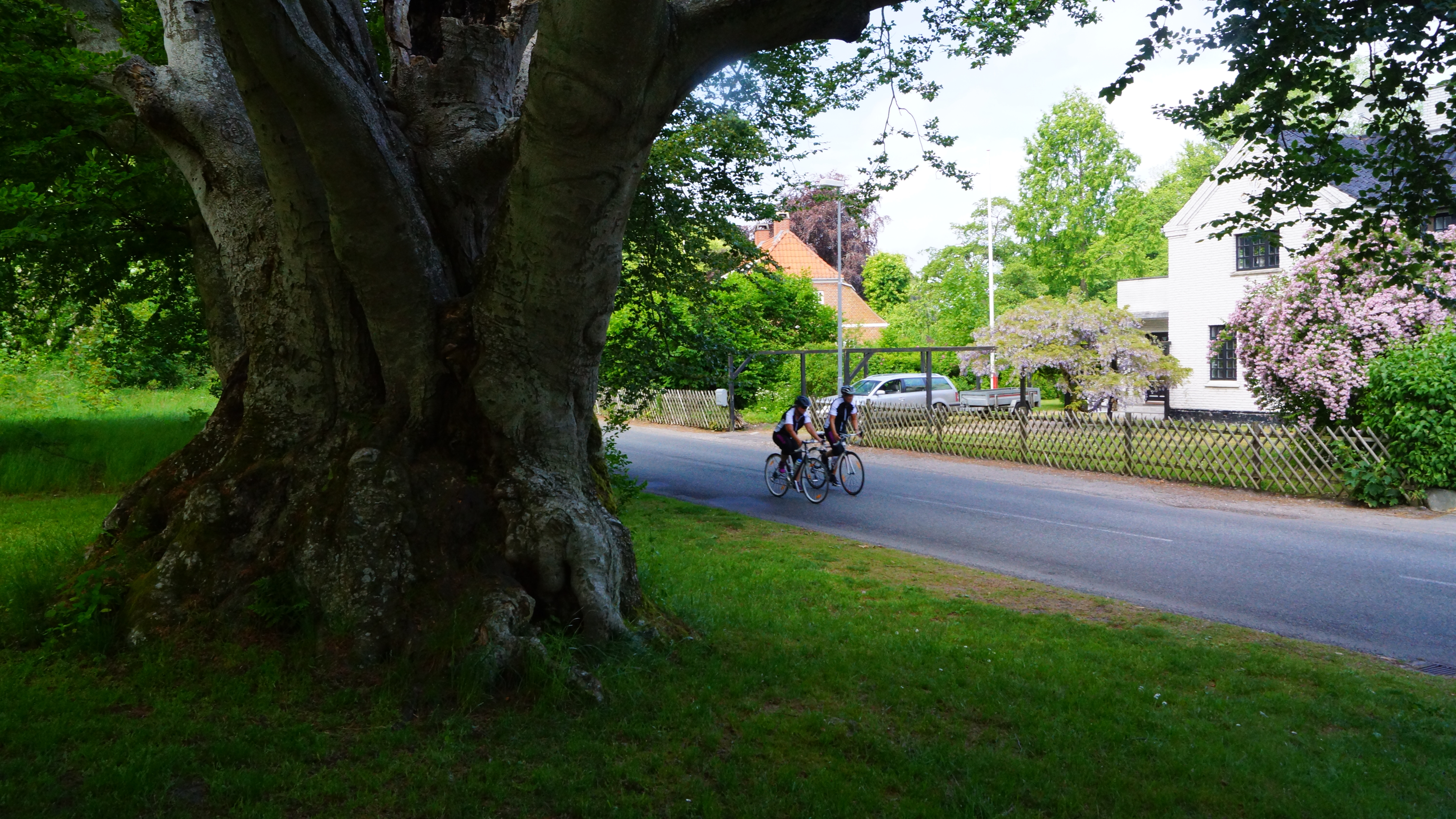 Svalebøgen, Gjerrild